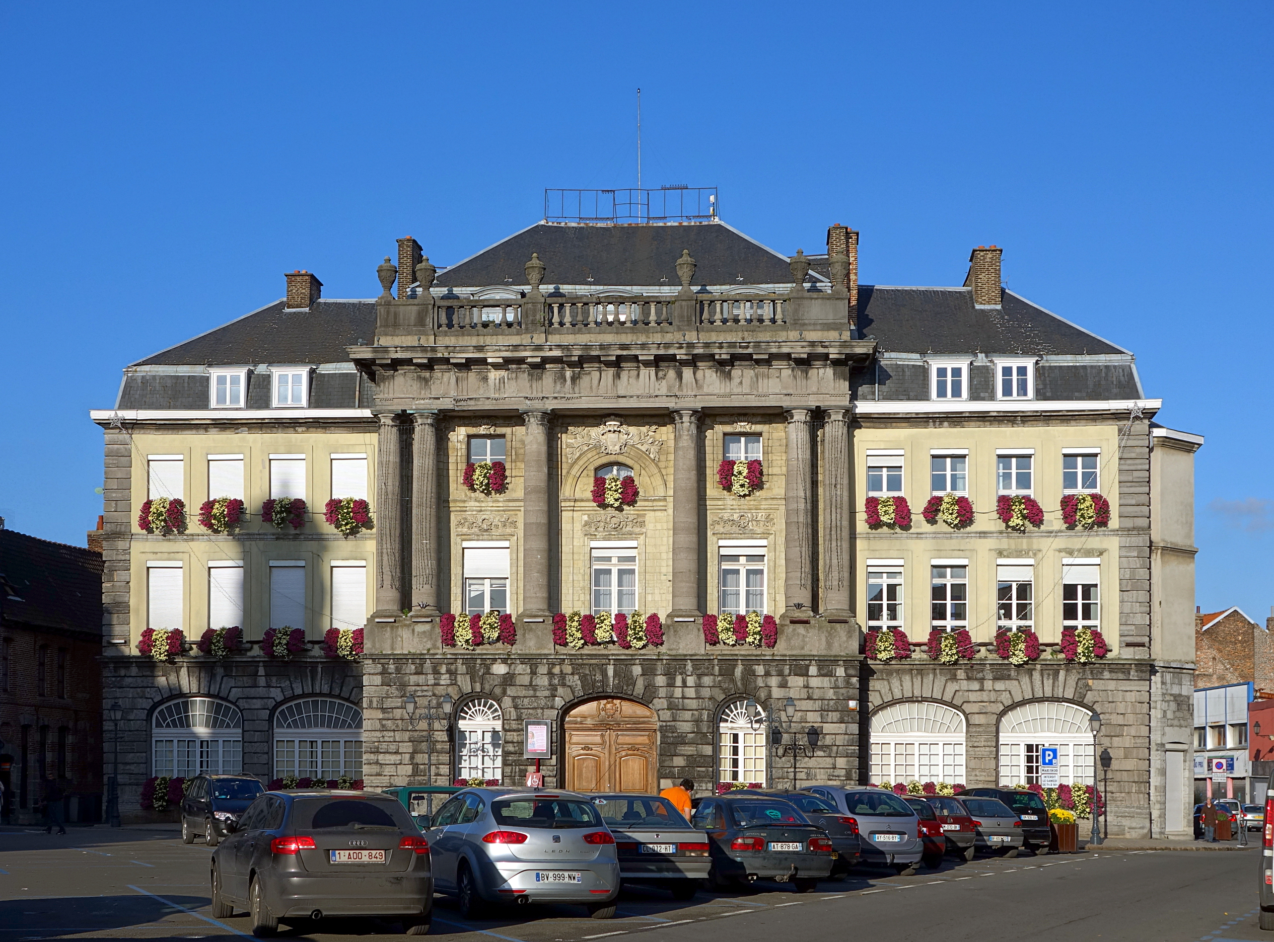 L'hôtel de ville de Condé-sur-l'Escaut (Nord).